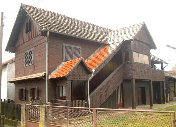 Čardak u Mraclinu kraj Velike Gorice.